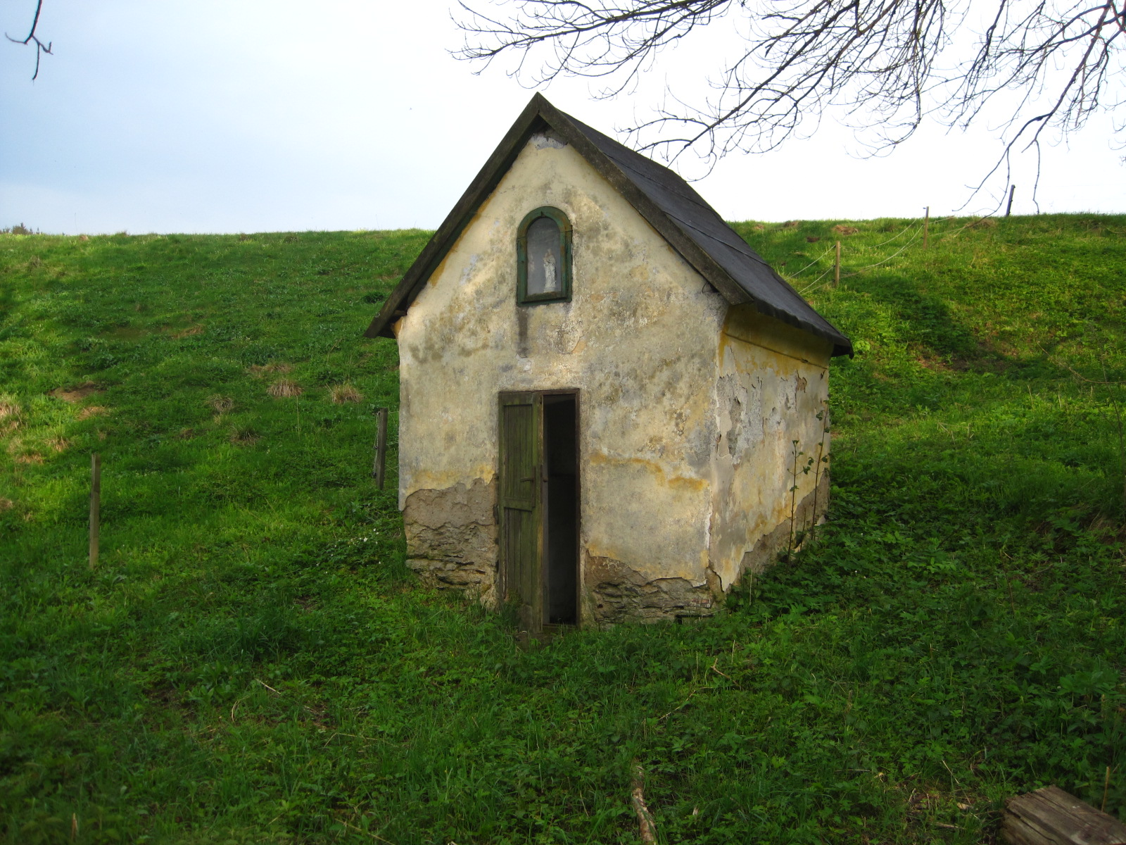 Ošerov (u Sedloňova) - kaple